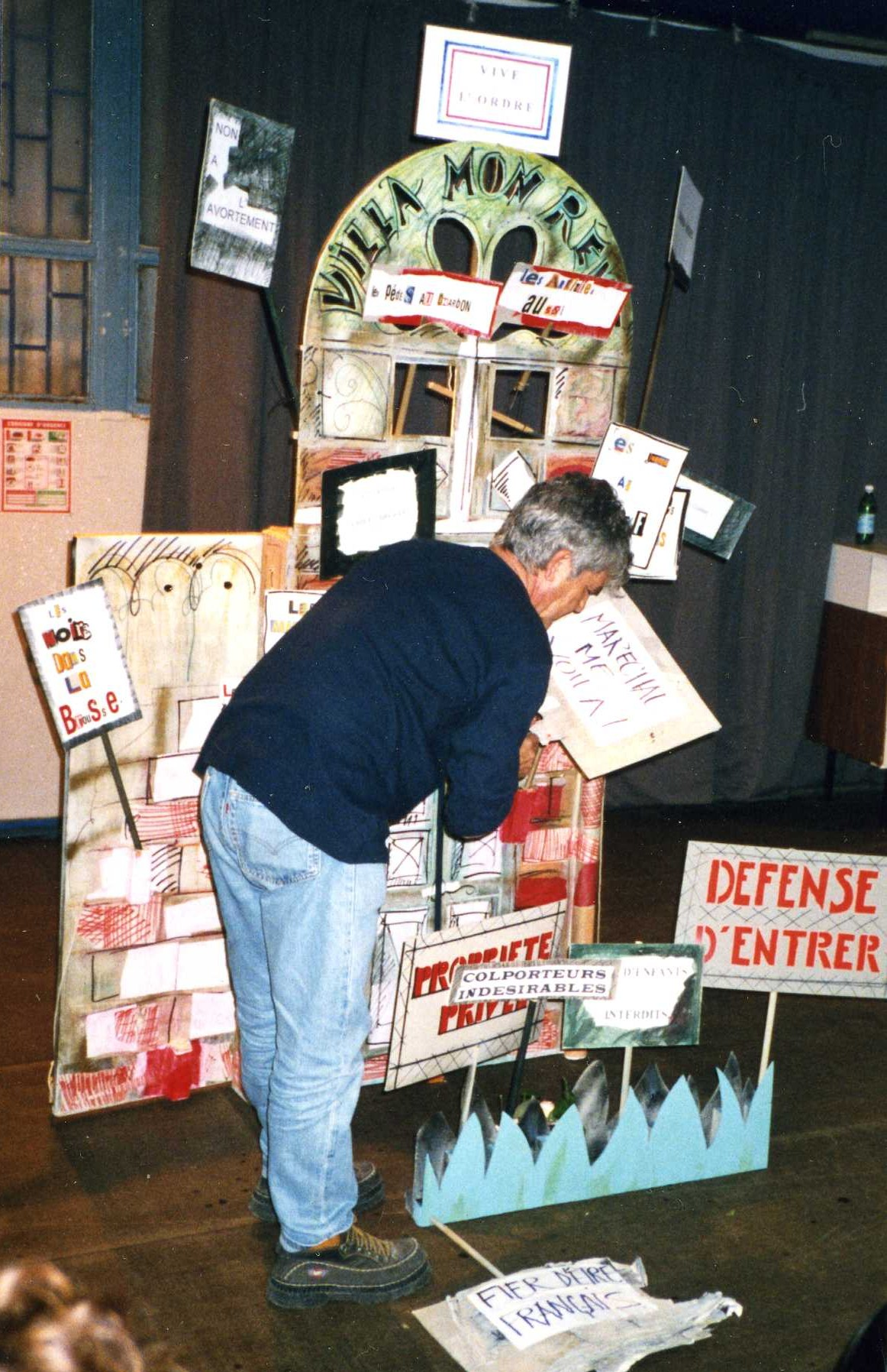 Le peintre et scènographe français Marius Rech, Cannes, 1998